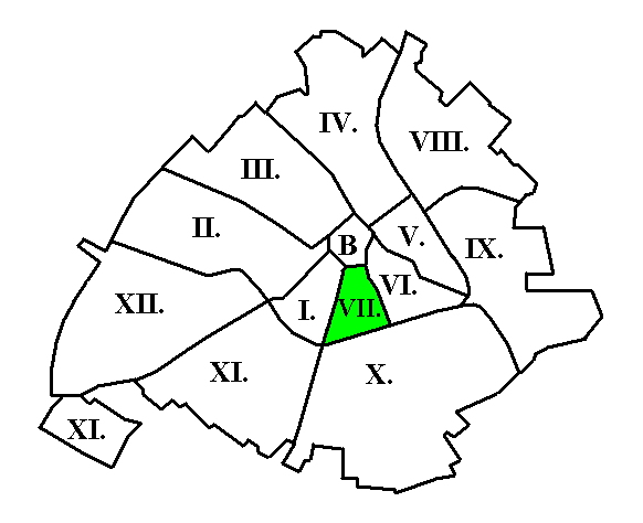 Kecskemét VII. kerülete (Kossuthváros) a térképen